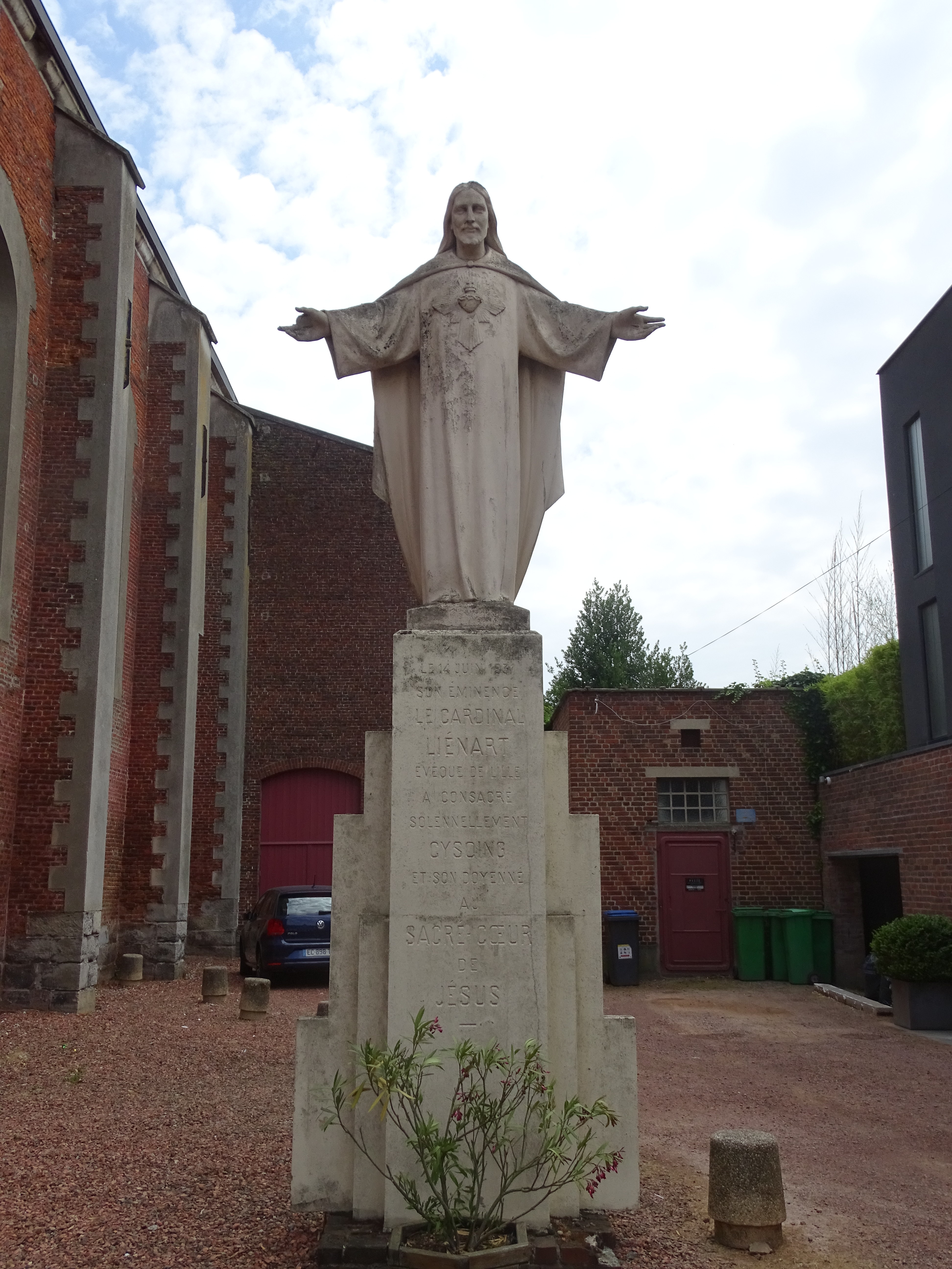 La sculpture du Sacré-Cœur, tout près de l'église Saint-Calixte-Saint-Évrard de Cysoing. Inscription : « Le 14 juin 1931 Son Éminence le Cardinal Liénart, évêque de Lille, a consacré solennellement Cysoing et son doyenné au Sacré-Cœur de Jésus ».